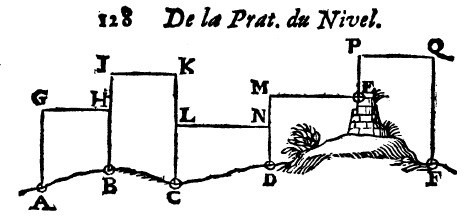 Un nivellement.